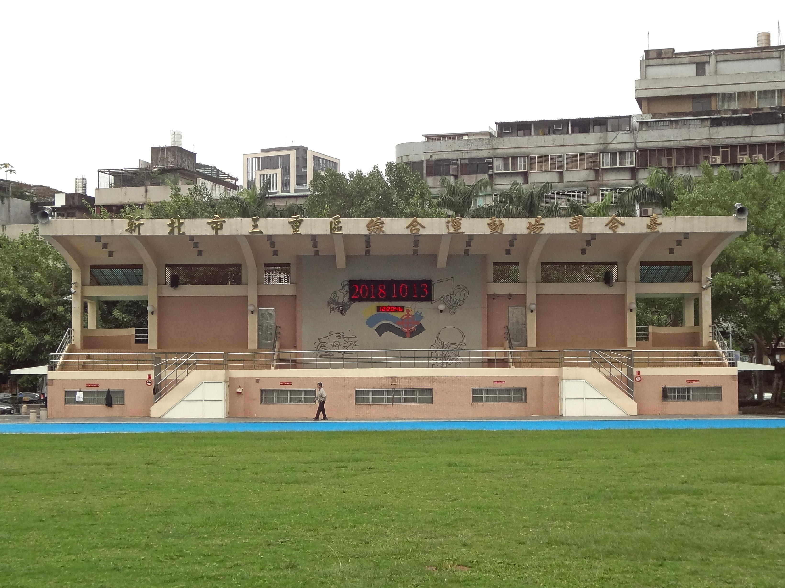 新北市三重區綜合運動場司令臺。